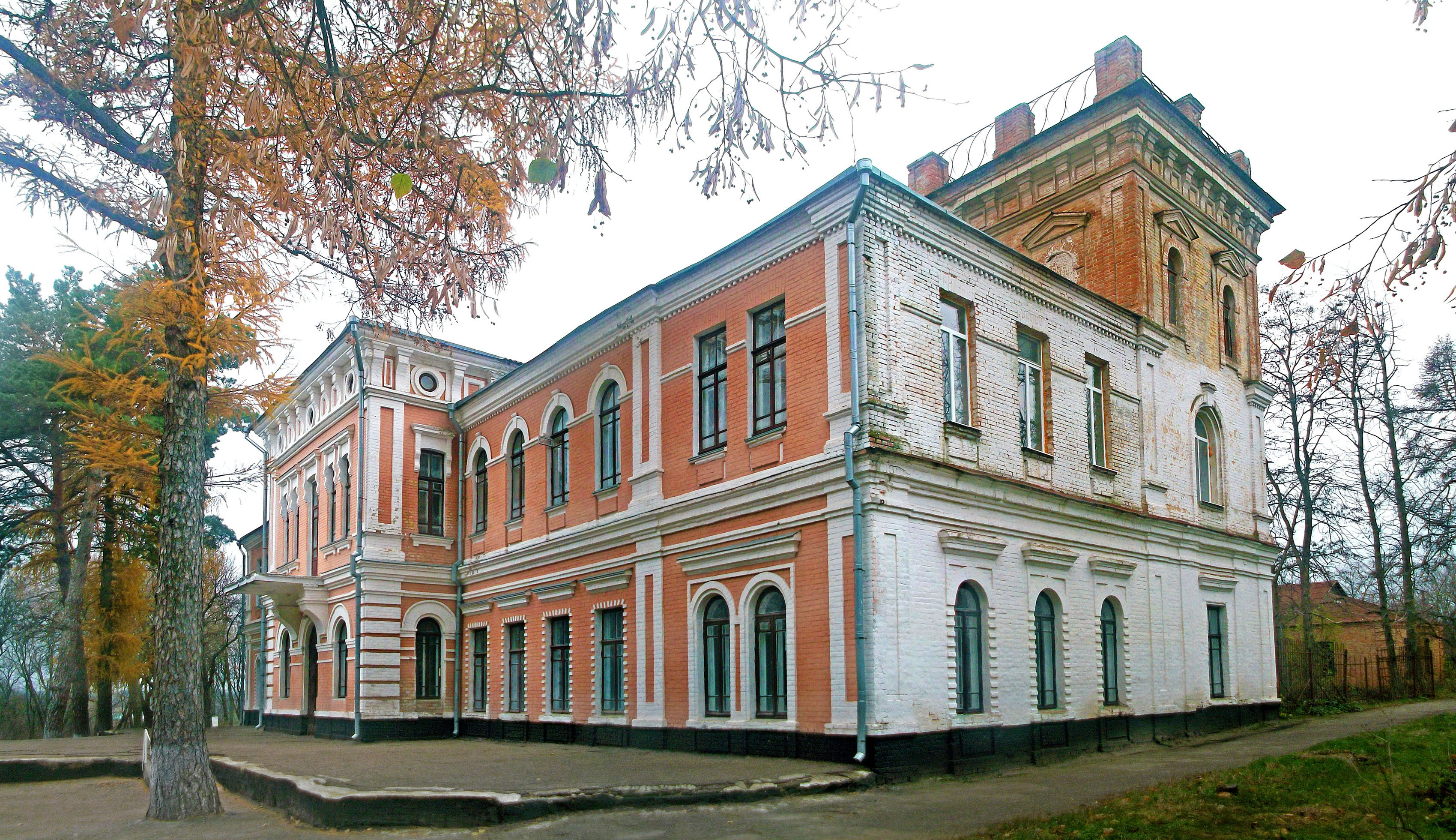 Садибний будинок, село Червоновершка, вул. Ліснича, 1